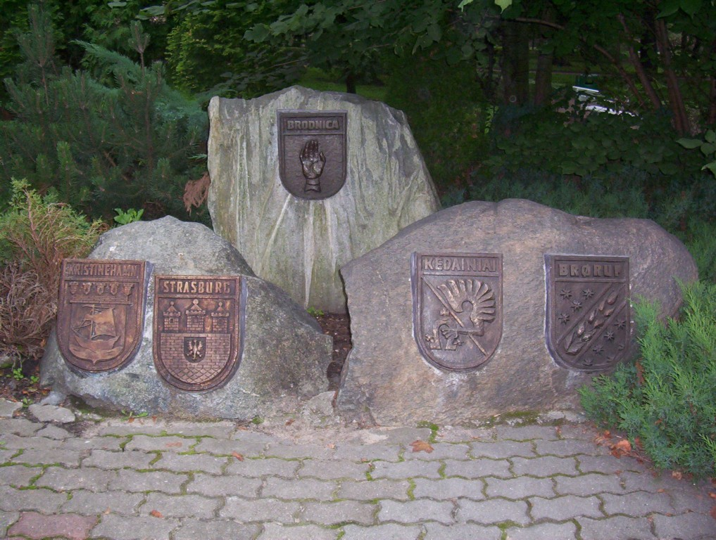 Brodnica, herby miast partnerskich